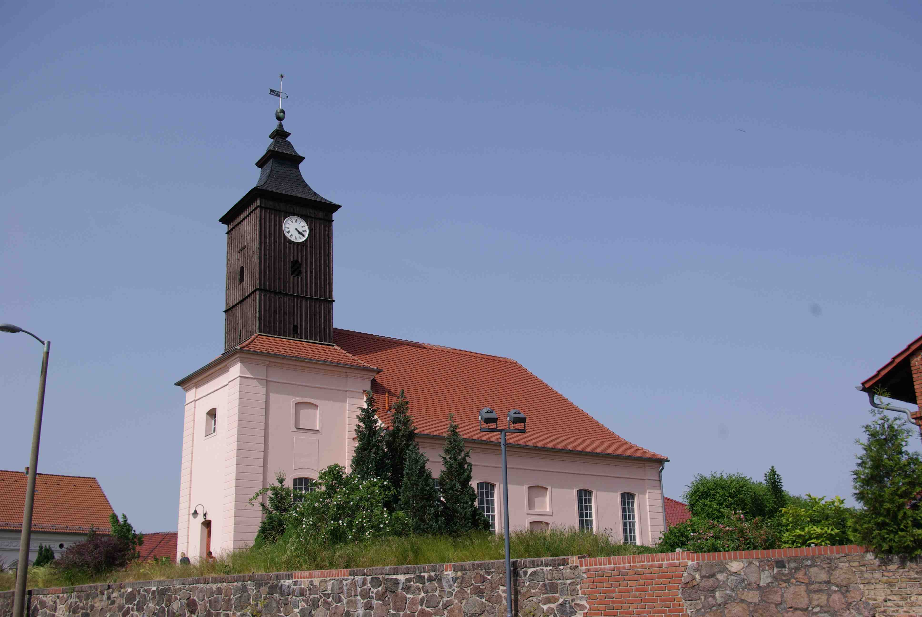 Ludwigsfelde in Brandenburg, Ortsteil Wietstock. Die barocke Kirche steht unter Denkmalschutz.